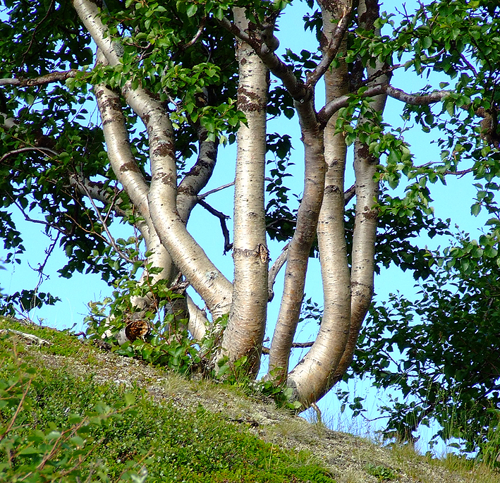 Fjällbirke im schwedischen Padjelanta-Nationalpark